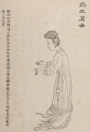 缇萦是西汉名医仓公淳于意的女儿，曾上书给汉文帝替父求情，典故“缇萦救父”。